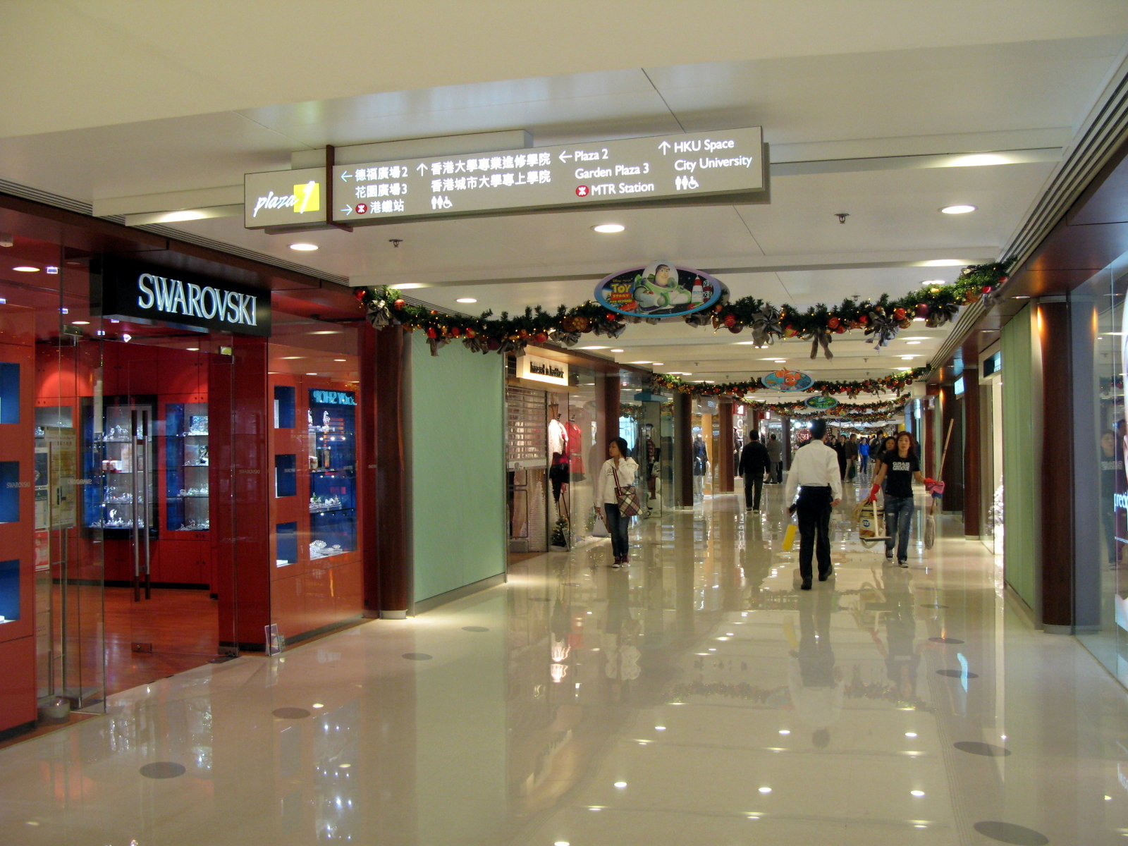 HK Telford Plaza Phase 1 corridor